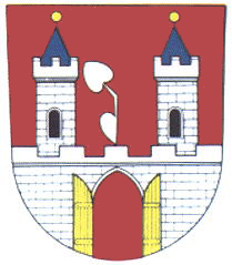 Pňovany znak